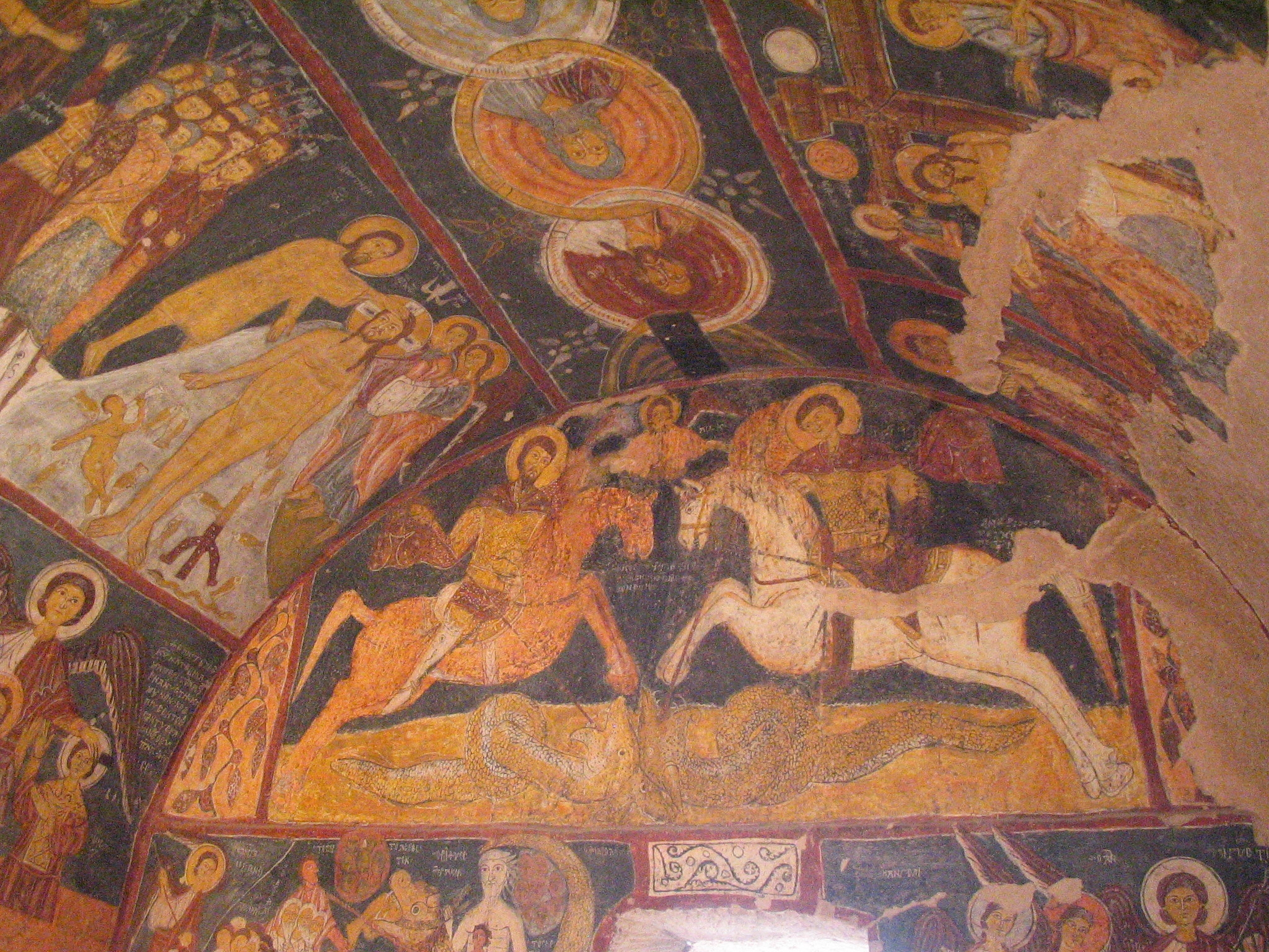 Fresken in der Johanneskirche in Gülsehir, Kappadokien, Zentraltürkei